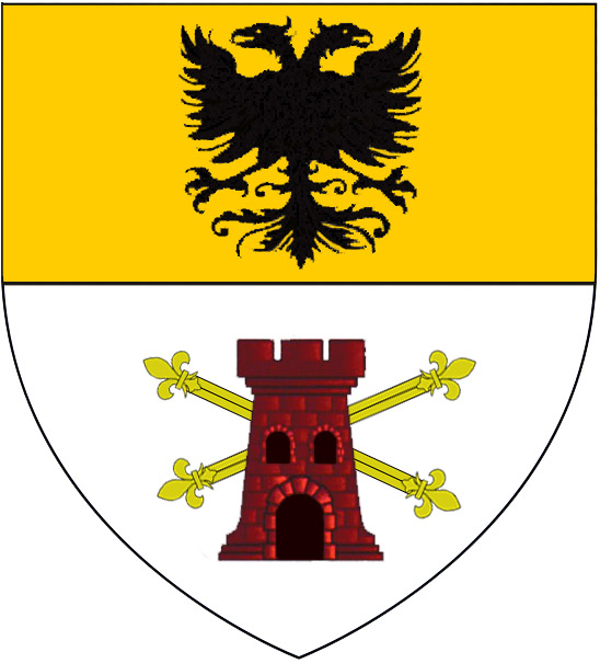 Stemma di Napoleone Della Torre.